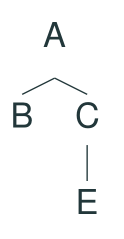 Arbre hierarchique